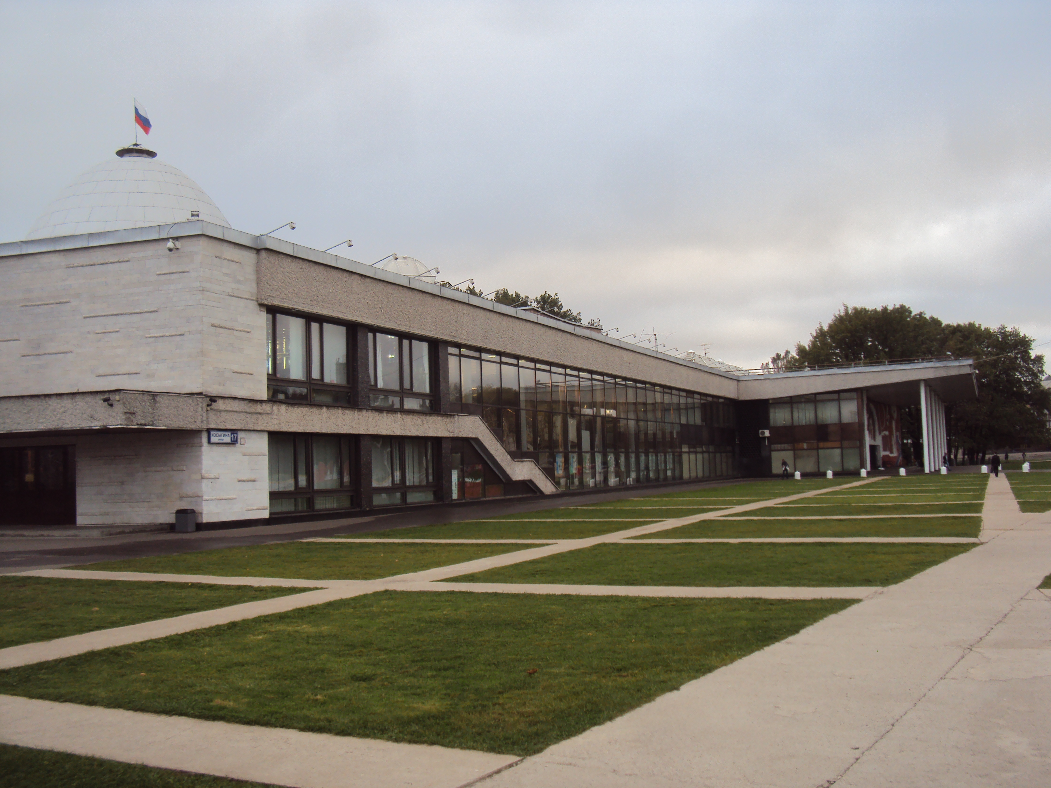 Главный корпус с выставочными залами, планетарием, зимним садом с тремя зенитными куполами верхнего света, декоративным бассейном и мозаичным панно «Юные Ленинцы» на фасаде: Косыгина ул., дом 17, корпус 1, Гагаринский, Юго-Западный округ, Москва